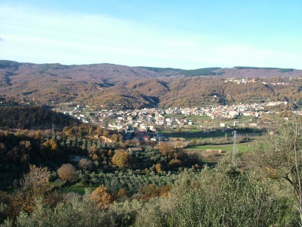 Panorama di San Vito sullo Jonio (CZ)